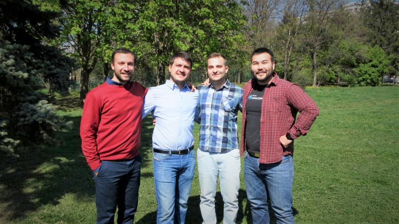 Основателите на софтуерната платформа Школо.бг